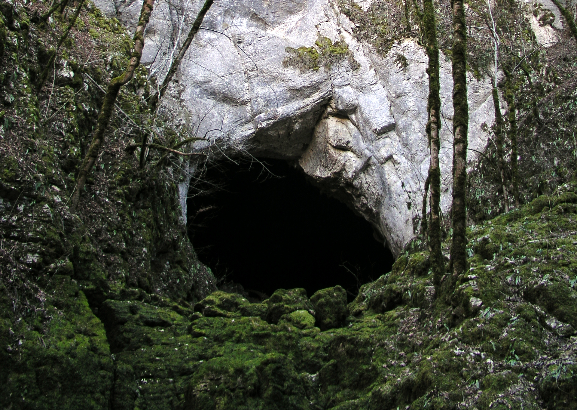 Baume Archee (Mouthier-Haute-Pierre)